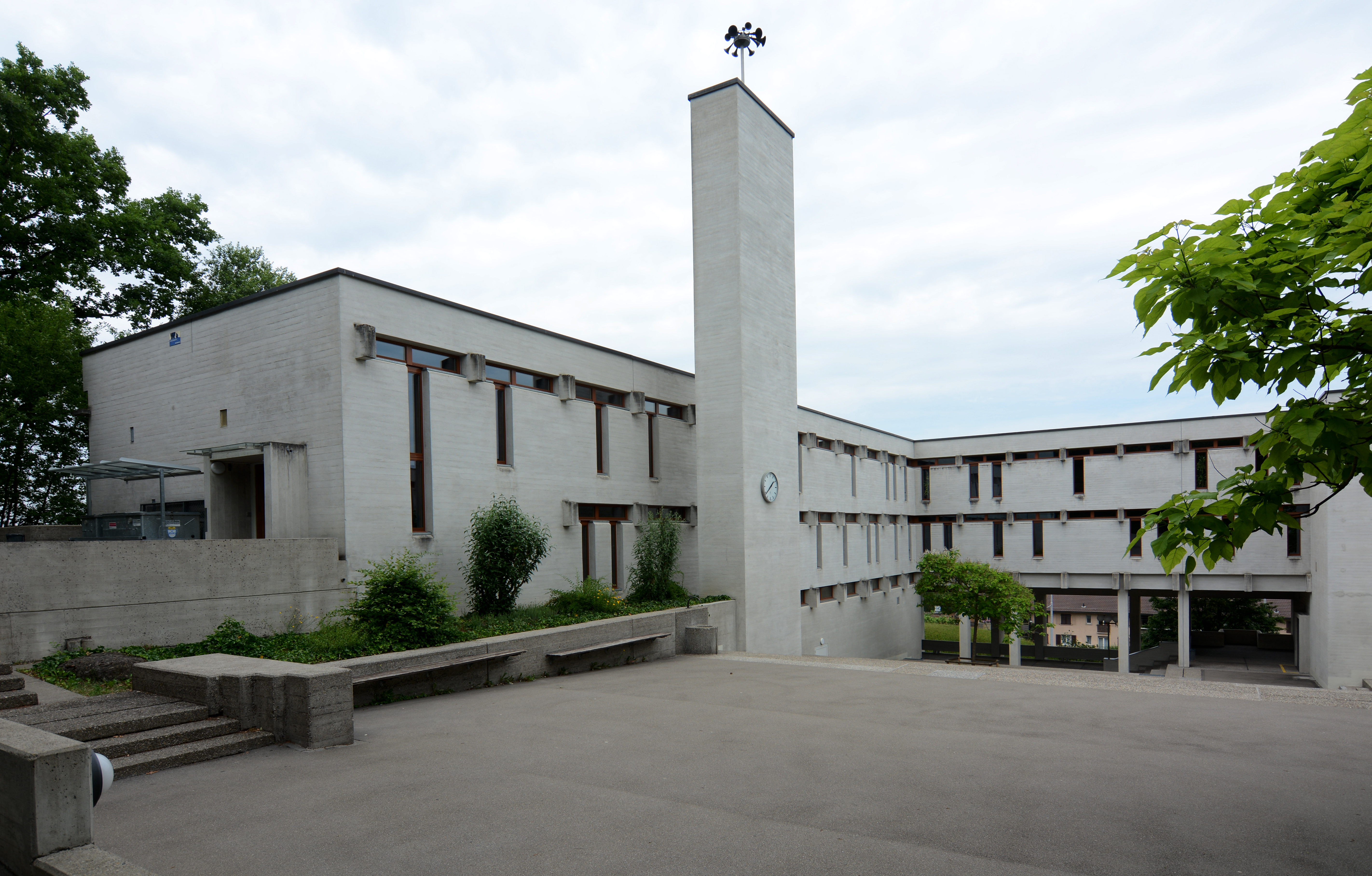 Das Oberstufenschulhaus Stettbach, Zürich-Schwamendingen, 1961–67. Architekten: Rudolf und Esther Guyer.